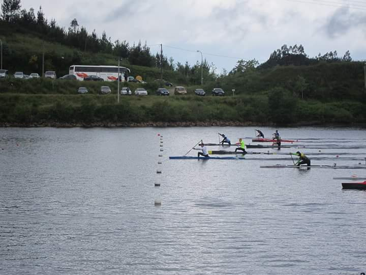 Carrera C1 en Copa 500 en Verducido